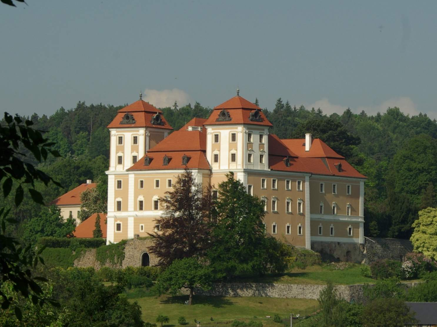 zámek Valeč od severovýchodu